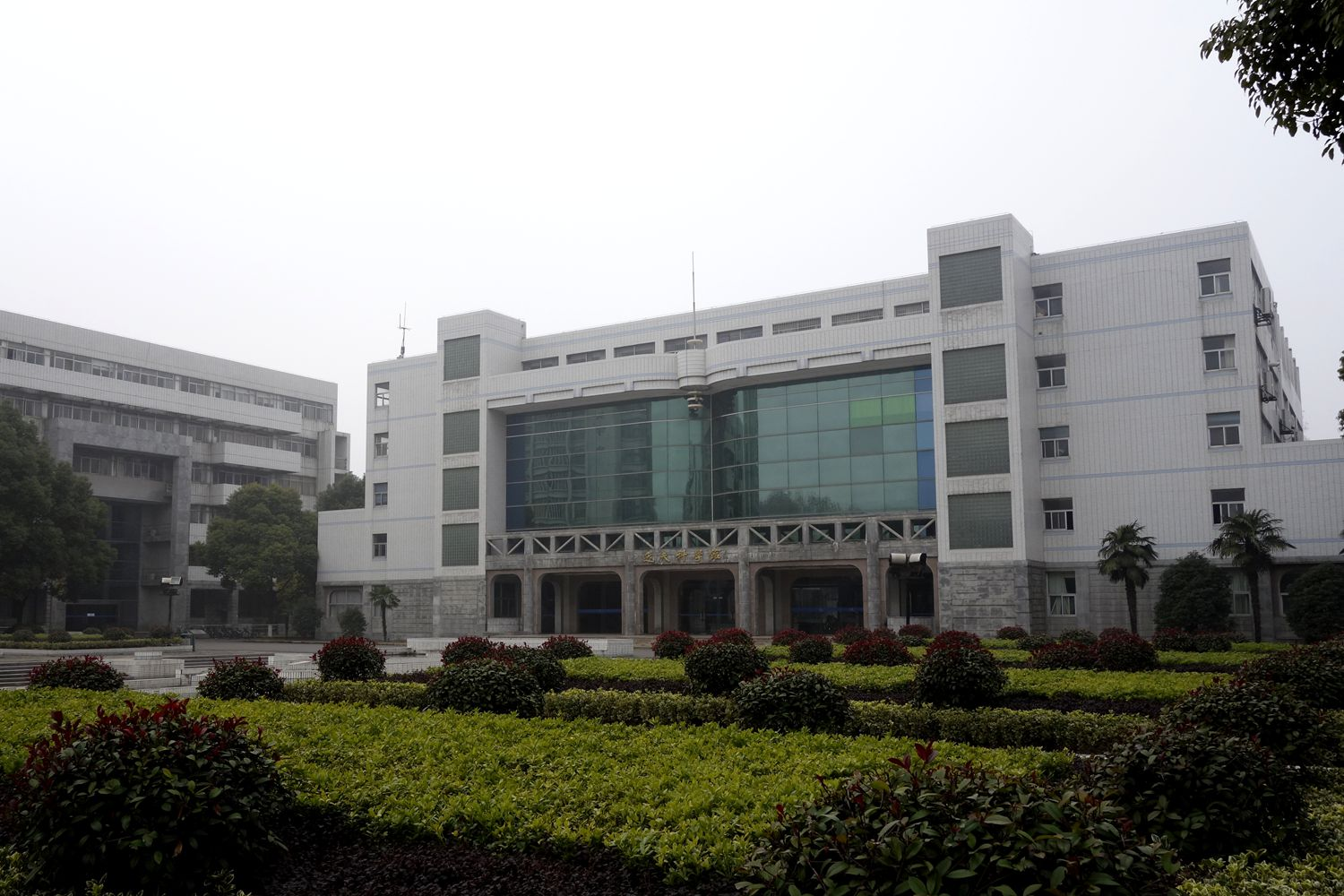 中文（中国大陆）: 南京航空航天大学 标营校区 逸夫科学馆